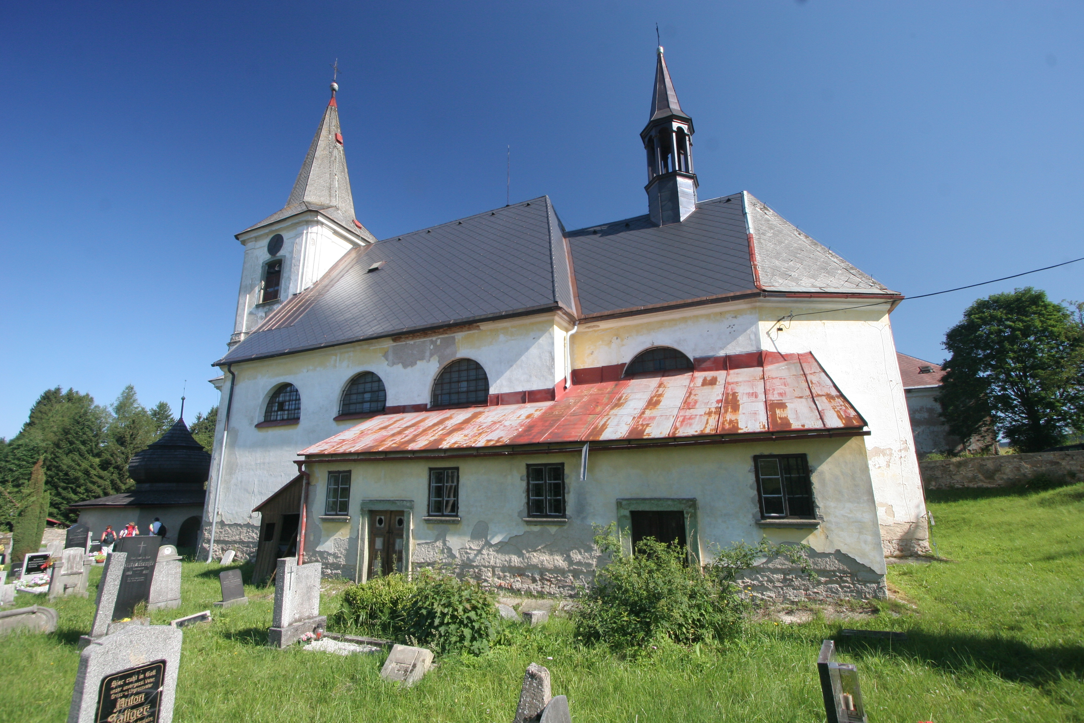 Kostel sv. Maří Magdalény (Bartošovice v Orlických horách), Bartošovice v Orlických horách